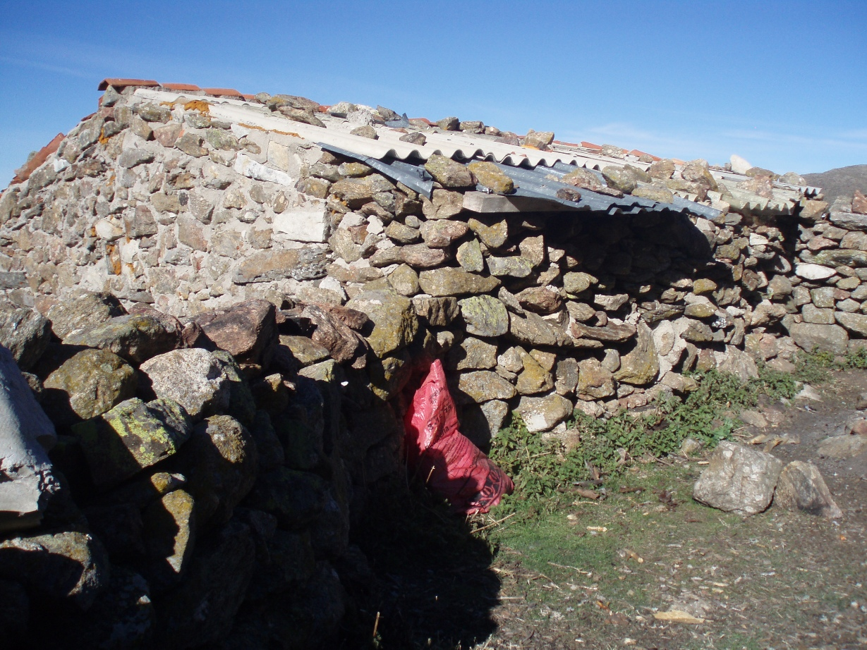 Refugio Majada Hambrienta, un refugio de montaña sin guardar situado en el Valle de Valsaín (España).